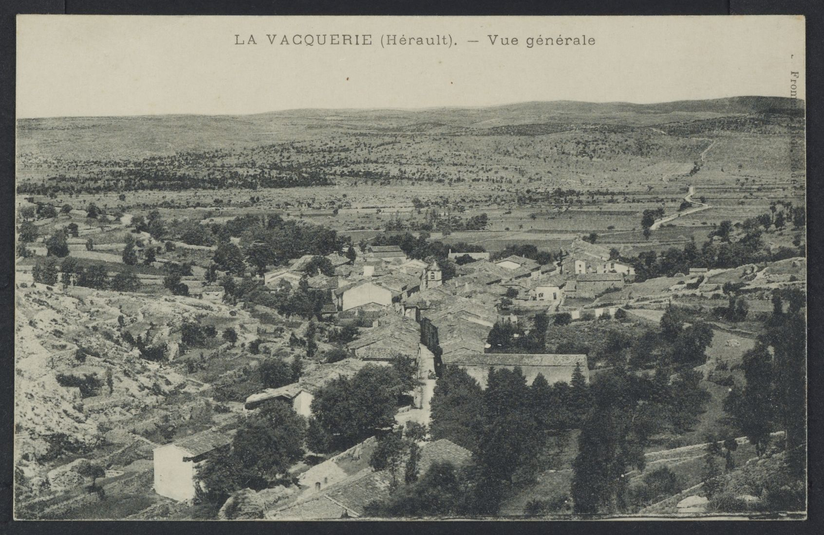 La Vacquerie. - Vue générale : carte postale.